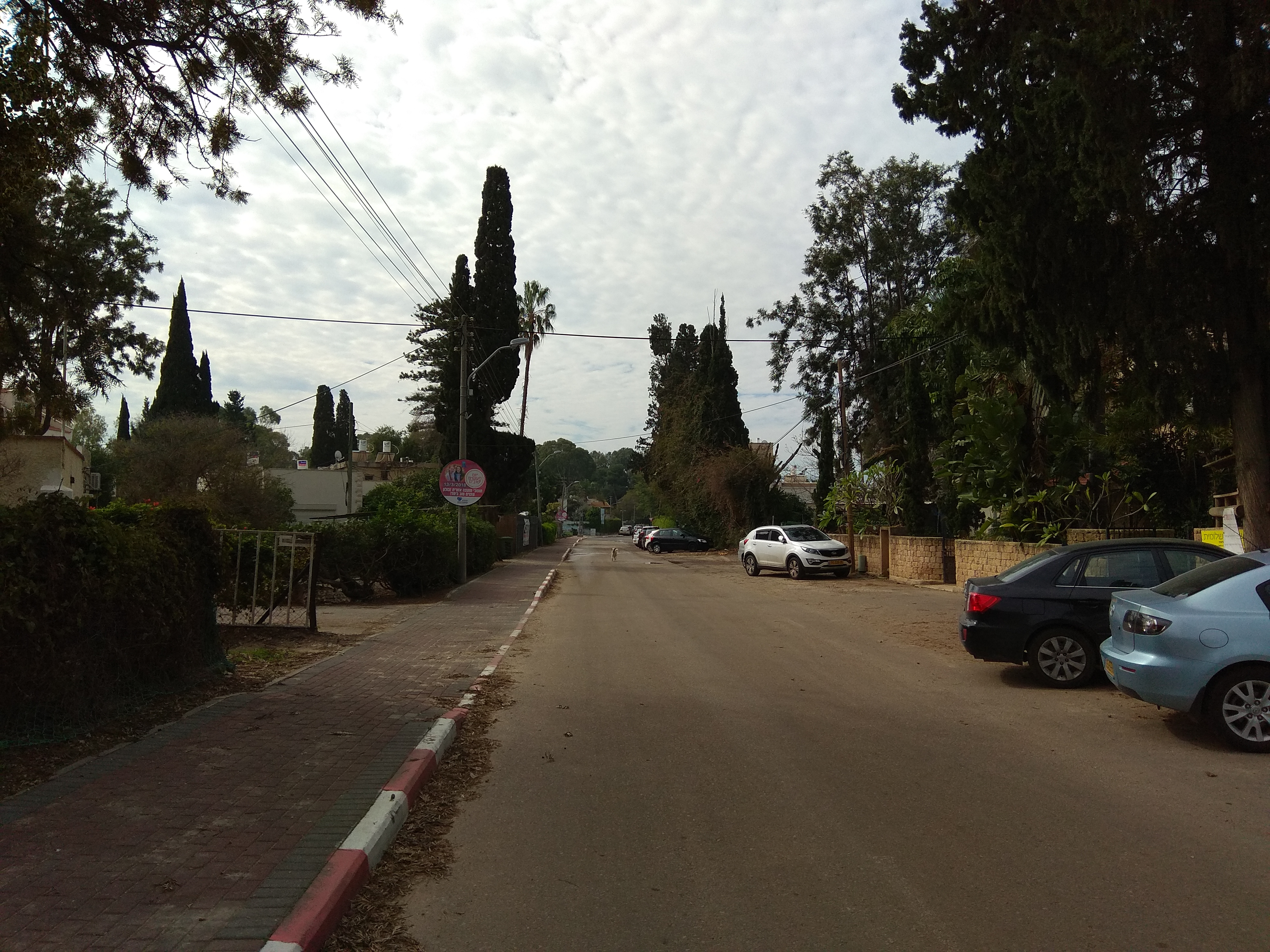 רחוב במושב